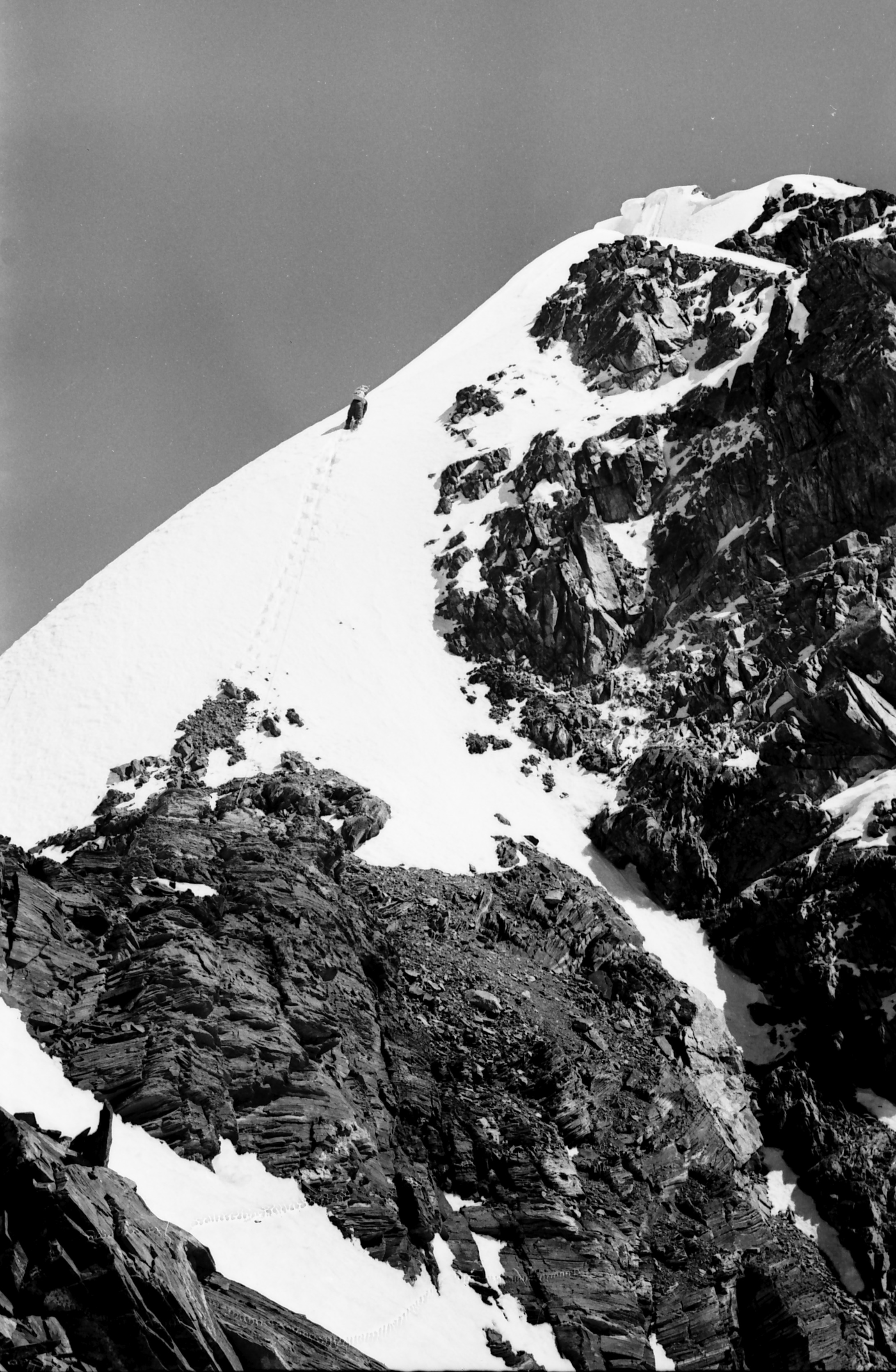 Ekspeditsioon mäetipule "Tartu Ülikool 350".